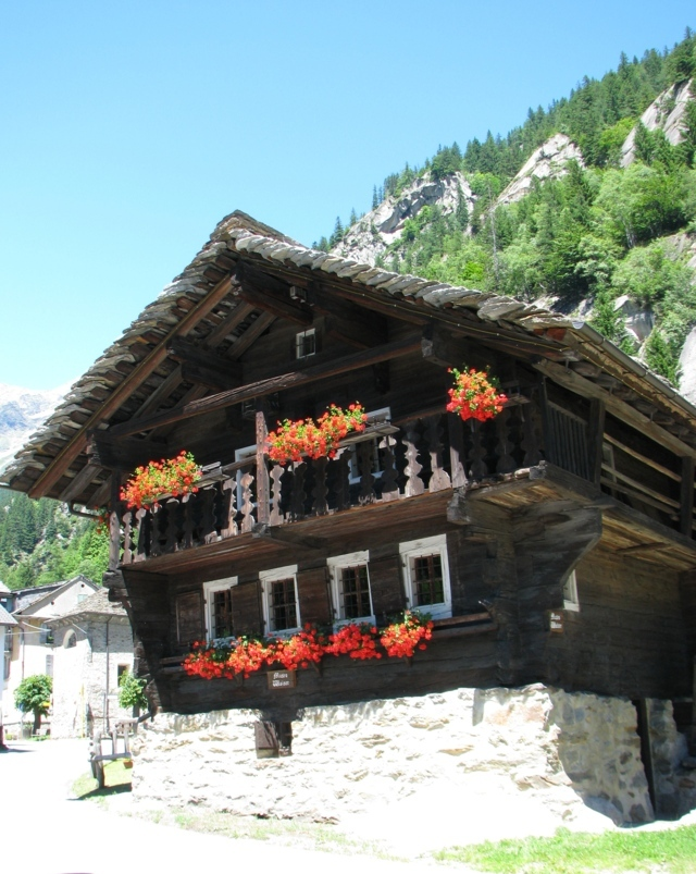 Il Museo Alts Walserüüs van zer Burfuggu di Macugnaga è un museo etnografico di cultura materiale Walser e alpina, ospitato in una casa Walser perfettamente conservata e datata 1610. Ospita ed espone una raccolta di 650 oggetti che narrano la vita quotidiana del fiero popolo Walser di Macugnaga ed è un gioiello di rara bellezza sotto la parete Est del Monte Rosa. This is a photo of a monument which is part of cultural heritage of Italy.